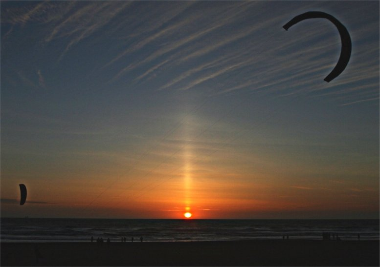 Sun Pillar